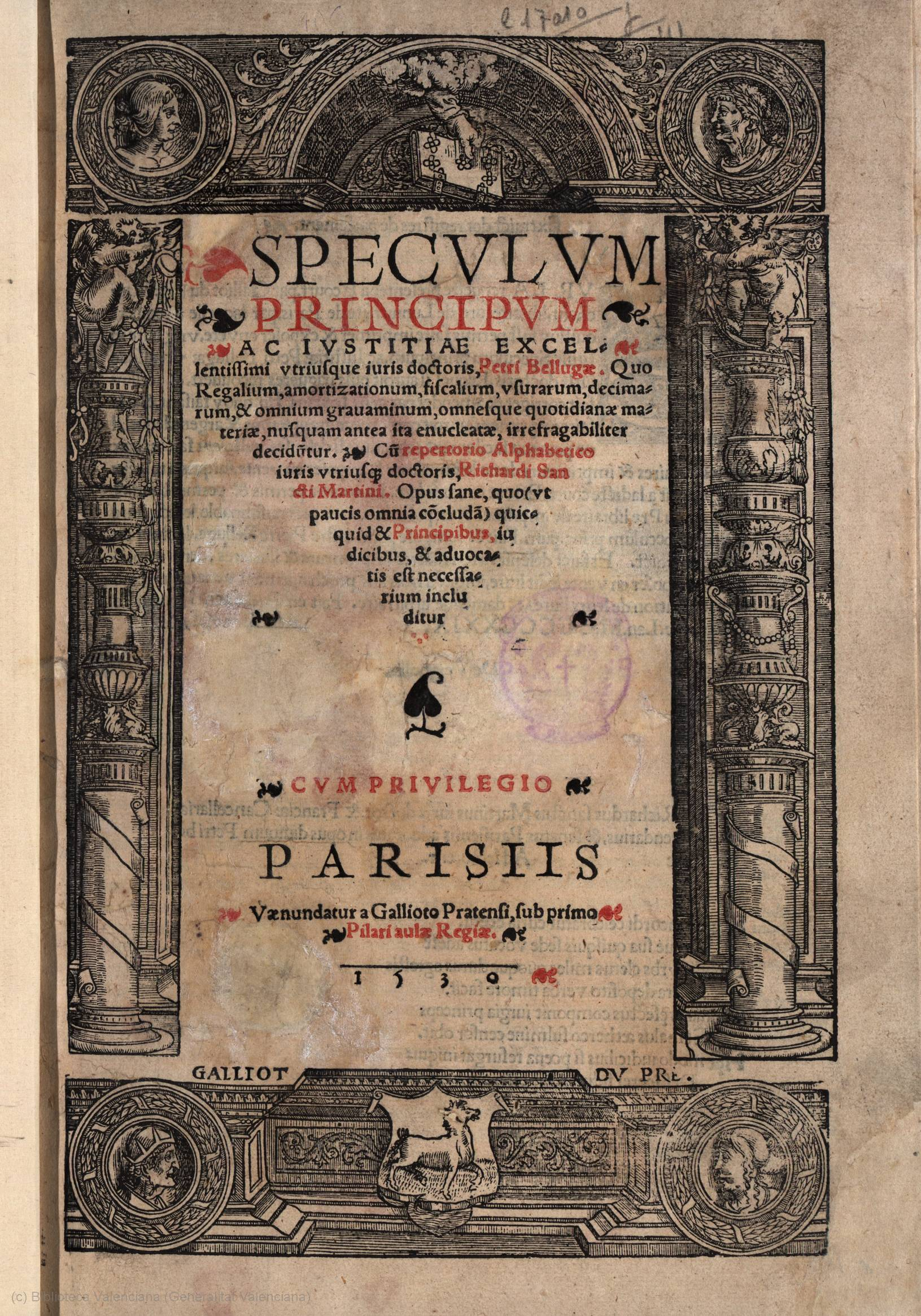 Frontis de Pere Belluga: Speculum principum, París, 1530. Biblioteca Valenciana Diigital